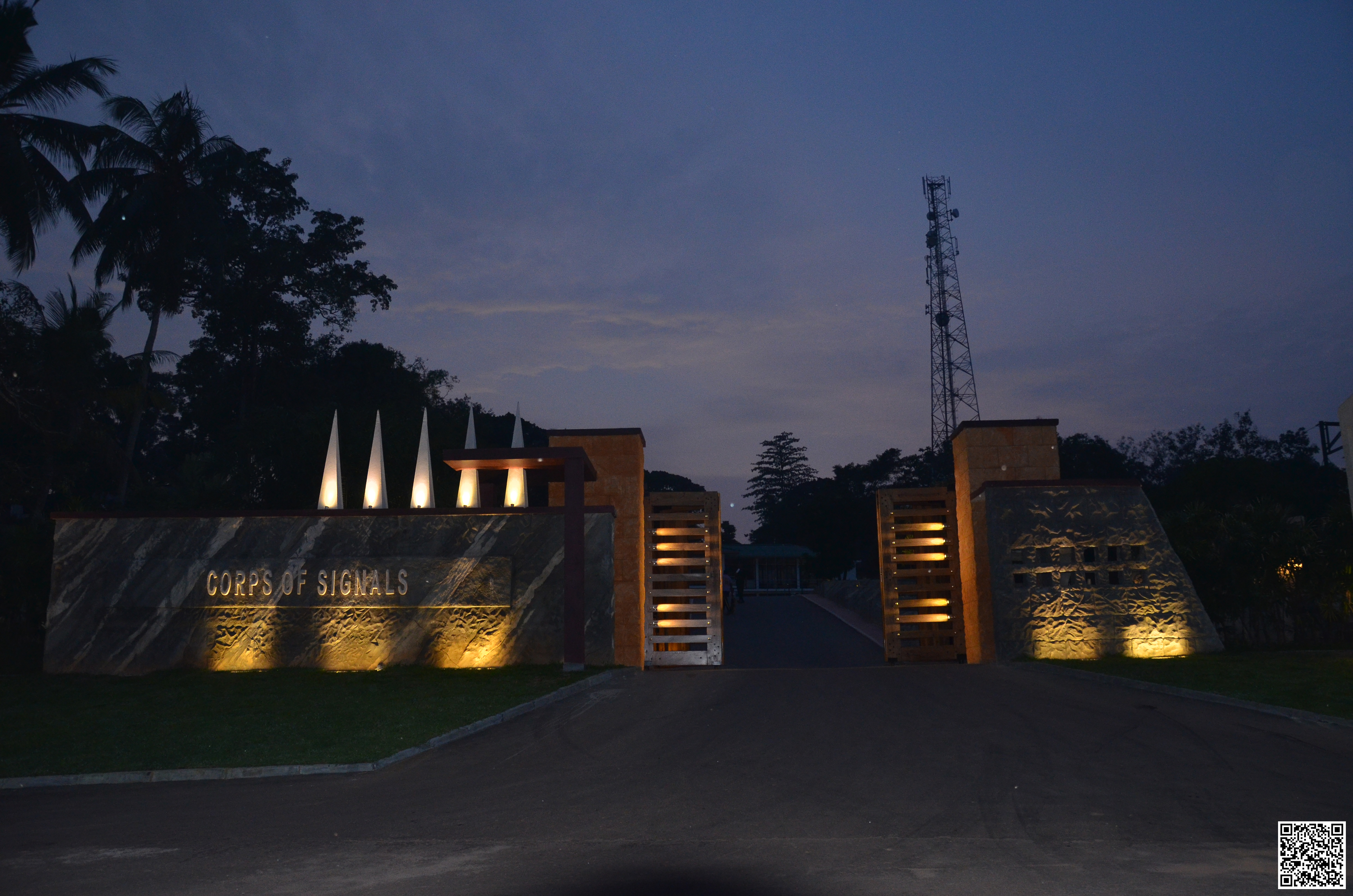 සිංහල: රෙජිමේන්තු මධ්‍යස්ථානය ශ්‍රි ලංකා සංඥා බලකායෙහි නව පිවිසුම් දොරටුව